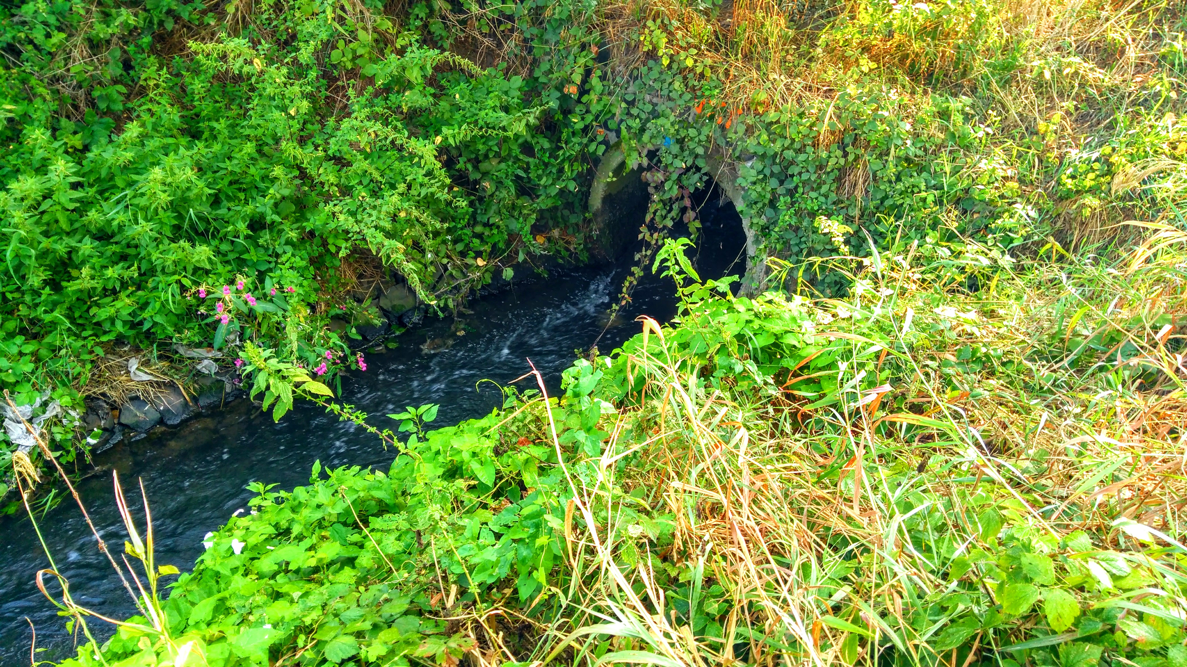 Přečištěná voda.